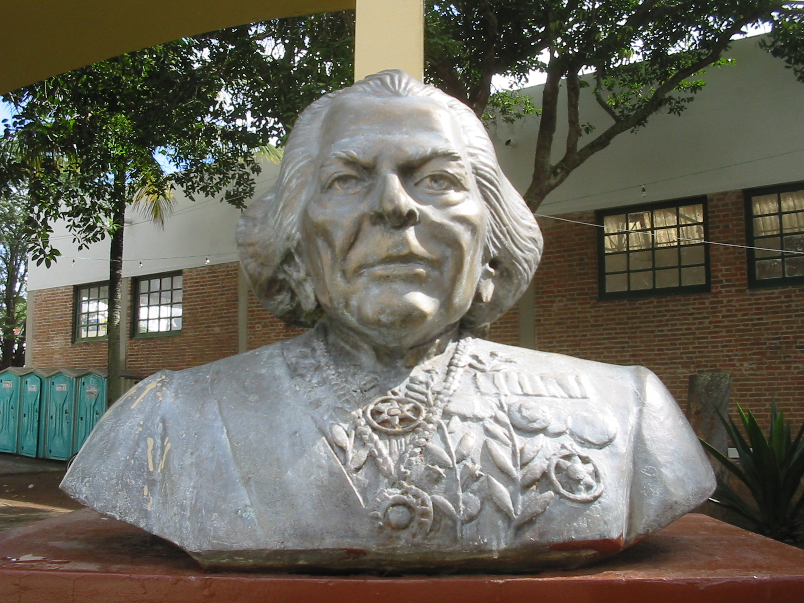 Caruaru (Pernambuco), Brasil. Busto de Austregésilo de Athayde em exibição pública. Caruaru (Pernambuco), Brazil. Austregésilo de Athayde sculpture.